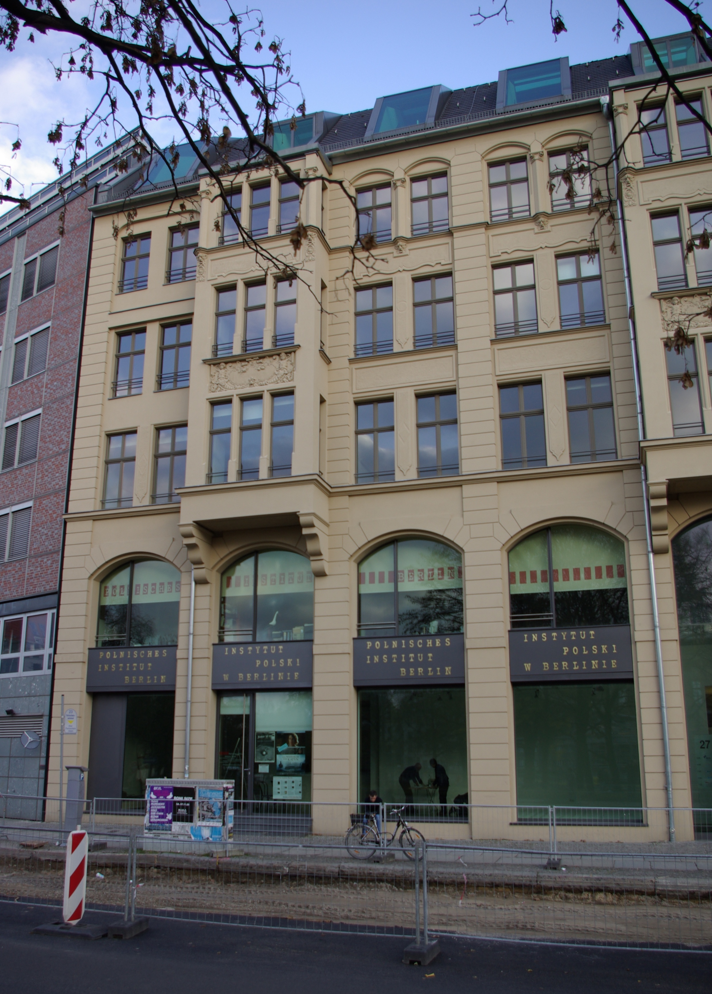 Instytut Polski w Berlinie